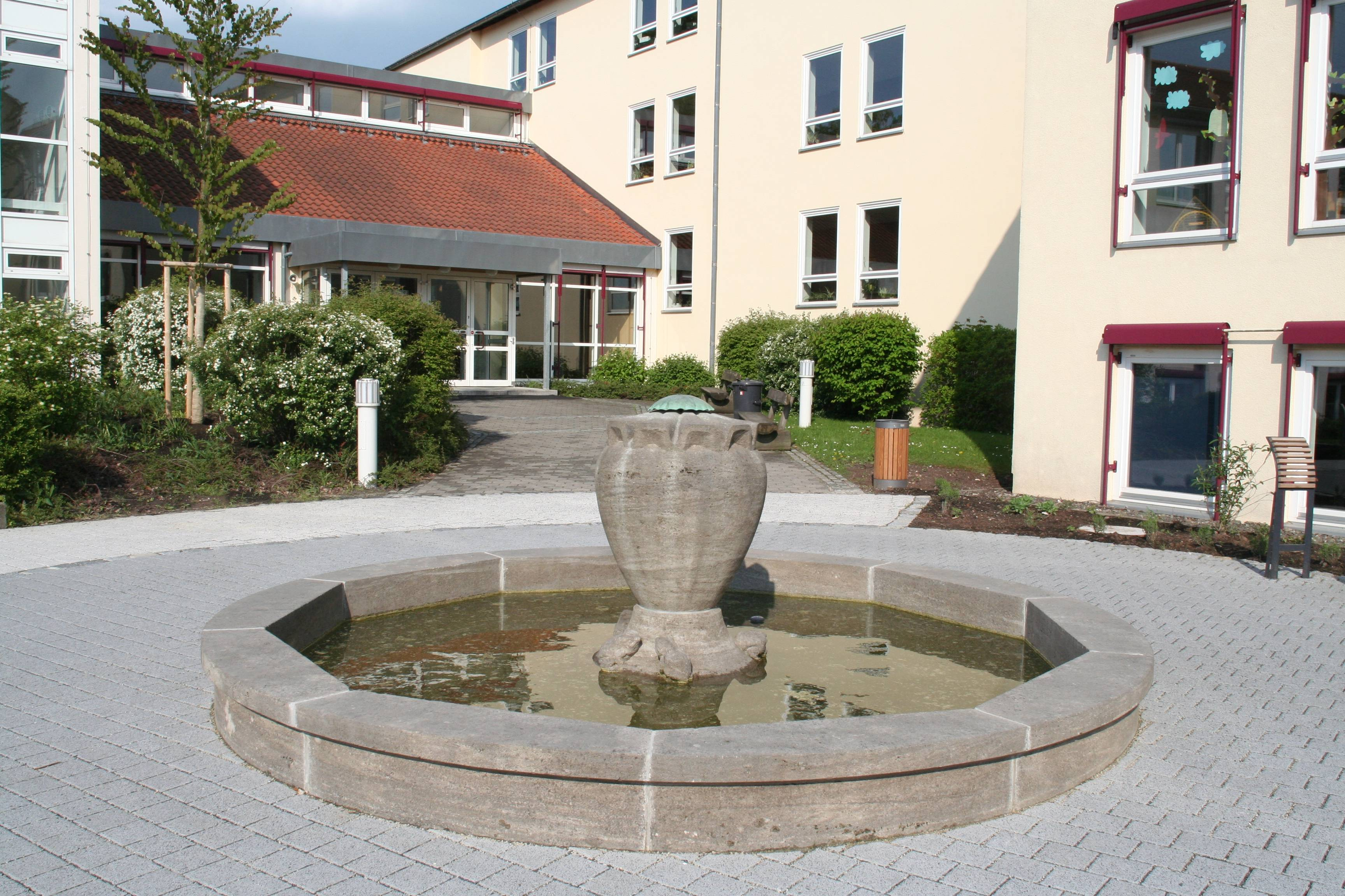 Brunnen in Seidmannsdorfer Straße 12 vor dem Gymn. Alexandrinum in Coburg